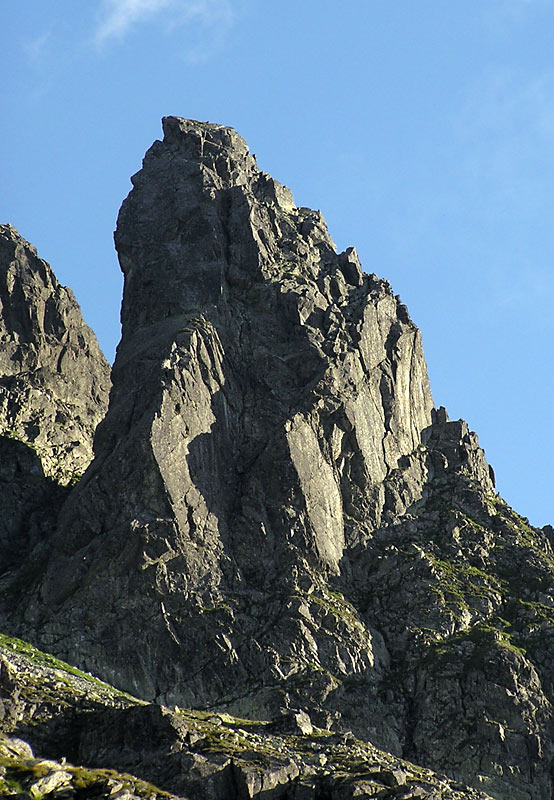 Zadni Mnich widziany od północy z Dolinki za Mnichem w świetle zachodzącego Słońca. Jestem autorem tego zdjęcia i udostępniam je na licencji